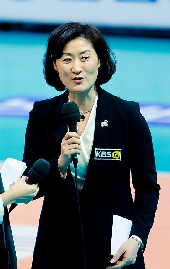 대한민국의 전 배구 선수 박미희.